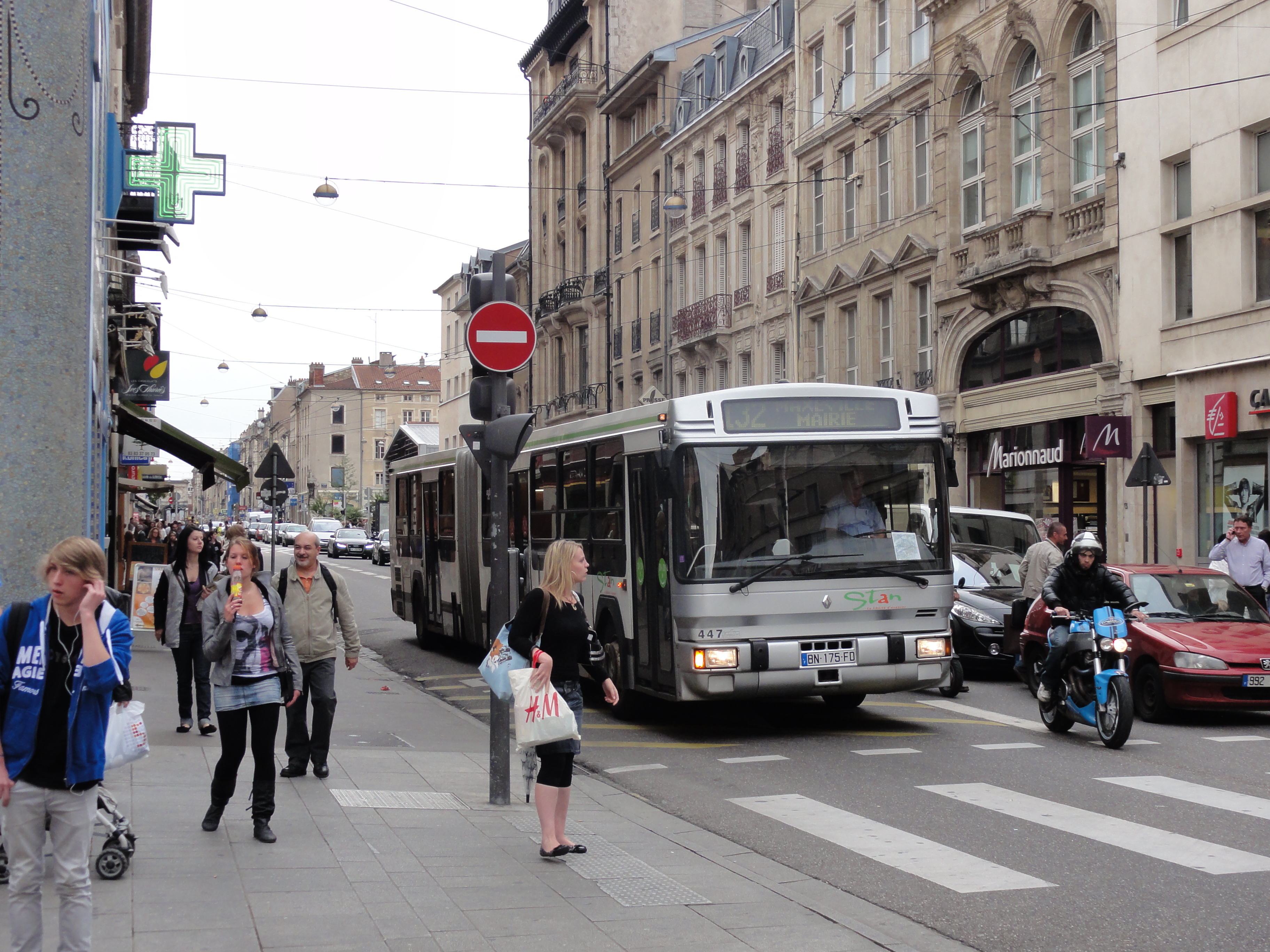 Renault PR118 à Nancy